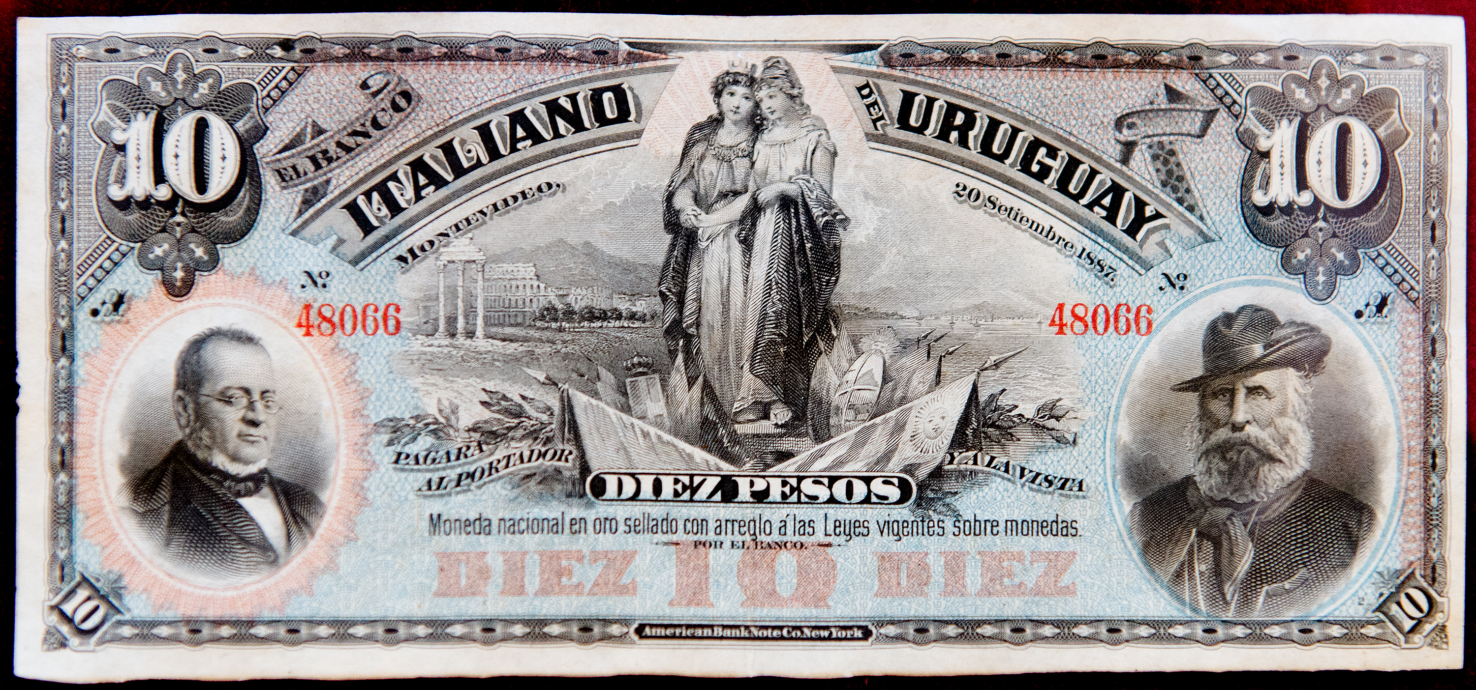 Billete de 10 pesos, emitido por el Banco Italiano del Uruguay. Con la efigie de José Garibaldi. 20 de setiembre de 1887. 18,4 X 8,3 cm Museo Histórico Nacional - Casa de José Garibaldi, Montevideo, Uruguay